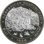 1996-cı ildə ilk dəfə olaraq Milli Bank tərəfindən Azərbaycanın görkəmli şair və mütəfəkkiri Məhəmməd Füzulinin həyat və yaradıcılığının (1494-1556) 500 illiyinə həsr olunmuş 50 manat dəyərində gümüş xatirə sikkəsi buraxılmışdır.